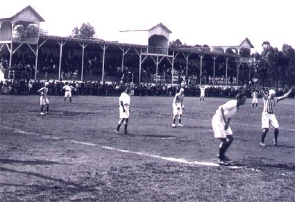 A velha baixada